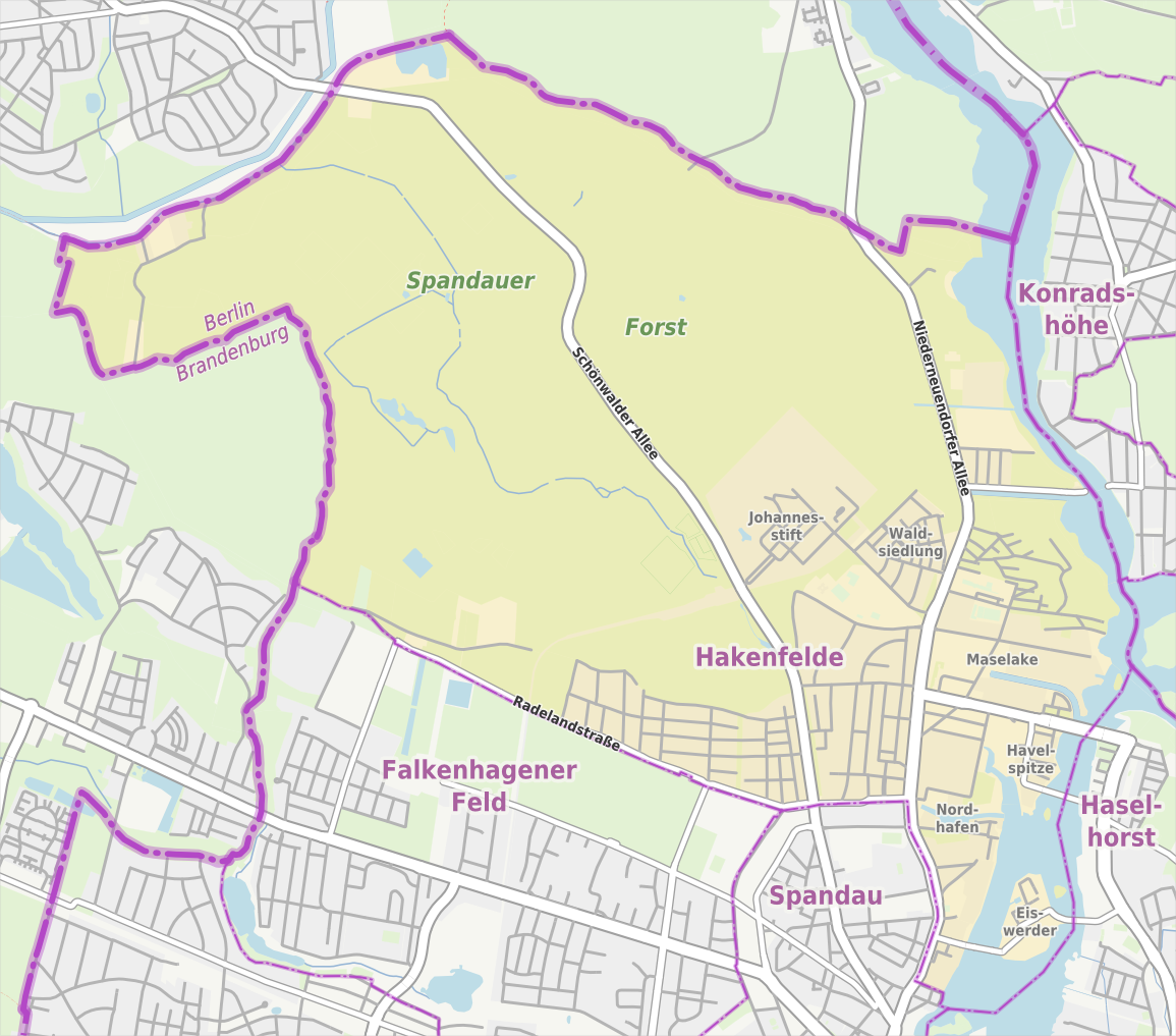 Übersichtskarte der Straßen und Ortslagen in Berlin-Hakenfelde